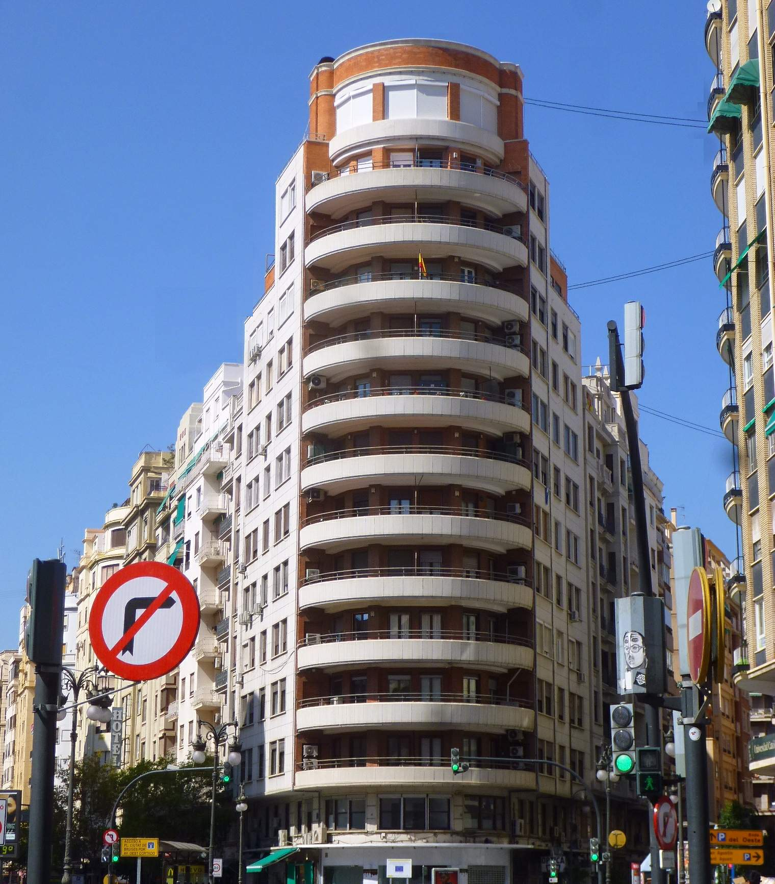 Valencia (España)